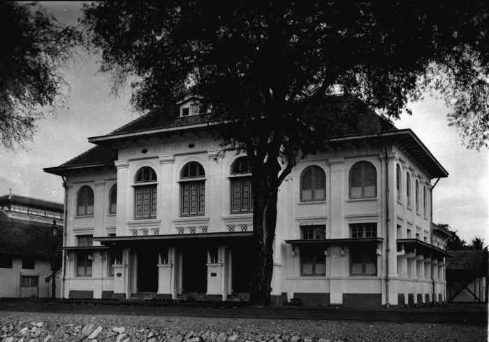 Foto. Het raadhuis te Makassar op Celebes.